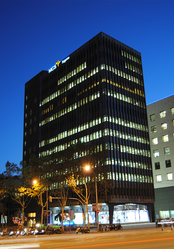 Sede Central de MGS Seguros en la Avenida Diagonal 543 de Barcelona